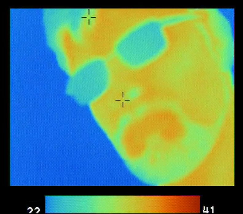 Foto del volto dell'autore effettuata con termocamera a alta risoluzione. Si può notare le aree a temperatura minore (vedi scala, colori "freddi" viranti al blu) su occhiali e capigliatura e le aree a temperatura maggiore (colori "caldi") dove i vai sanguigni sono più superficiali, rendendo la pelle più calda (labbram fronte)